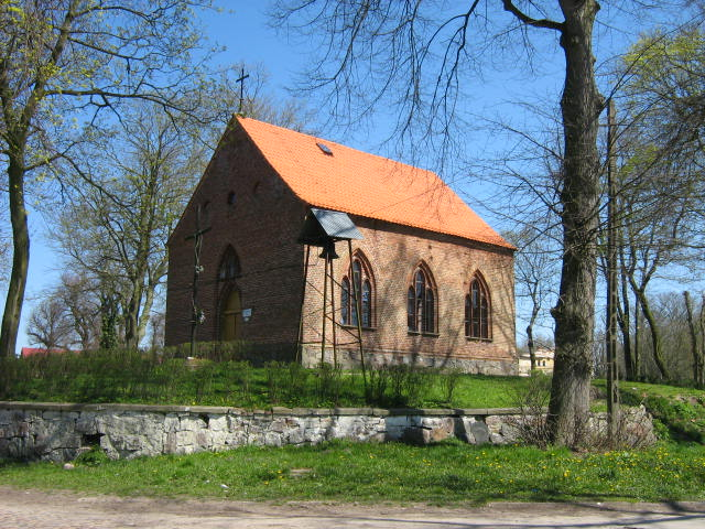 Wiejkowo - rzymskokatolicki kościół filialny p.w. Niepokalanego Poczęcia NMP